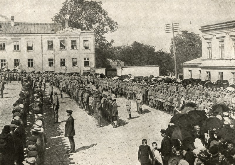 Polowa msza święta z udziałem oddziałów legionowych na placu Panny Marii w Kielcach.